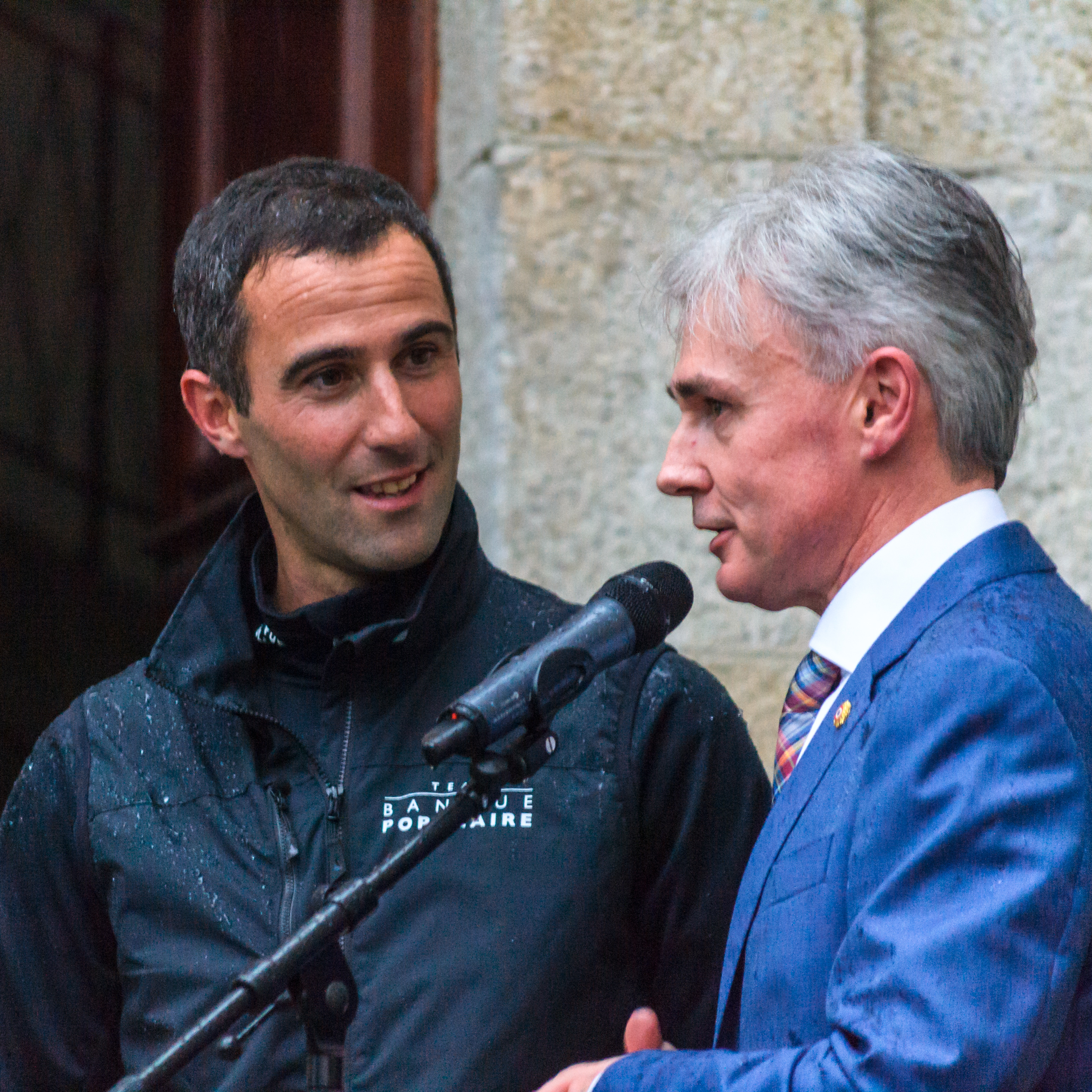 Armel Le Cléac'h, vainqueur du Vendée Globe, accueilli dans sa ville natale, à Saint-Pol-de-Léon (Finistère), place de l'hôtel de ville, le 31 mars 2017.